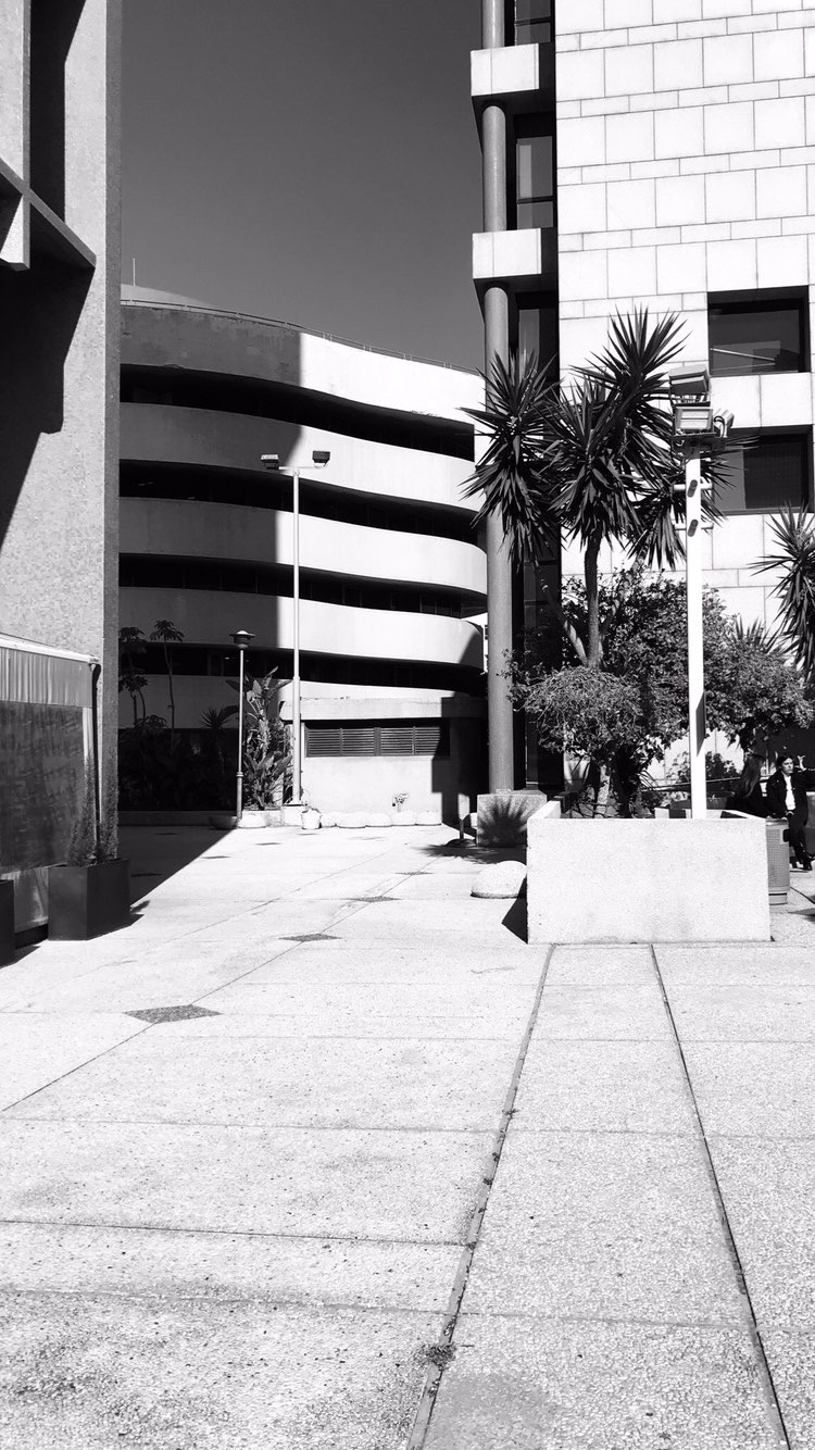 אמות בית אירופה מבט צד, שדרות שאול המלך תל אביב